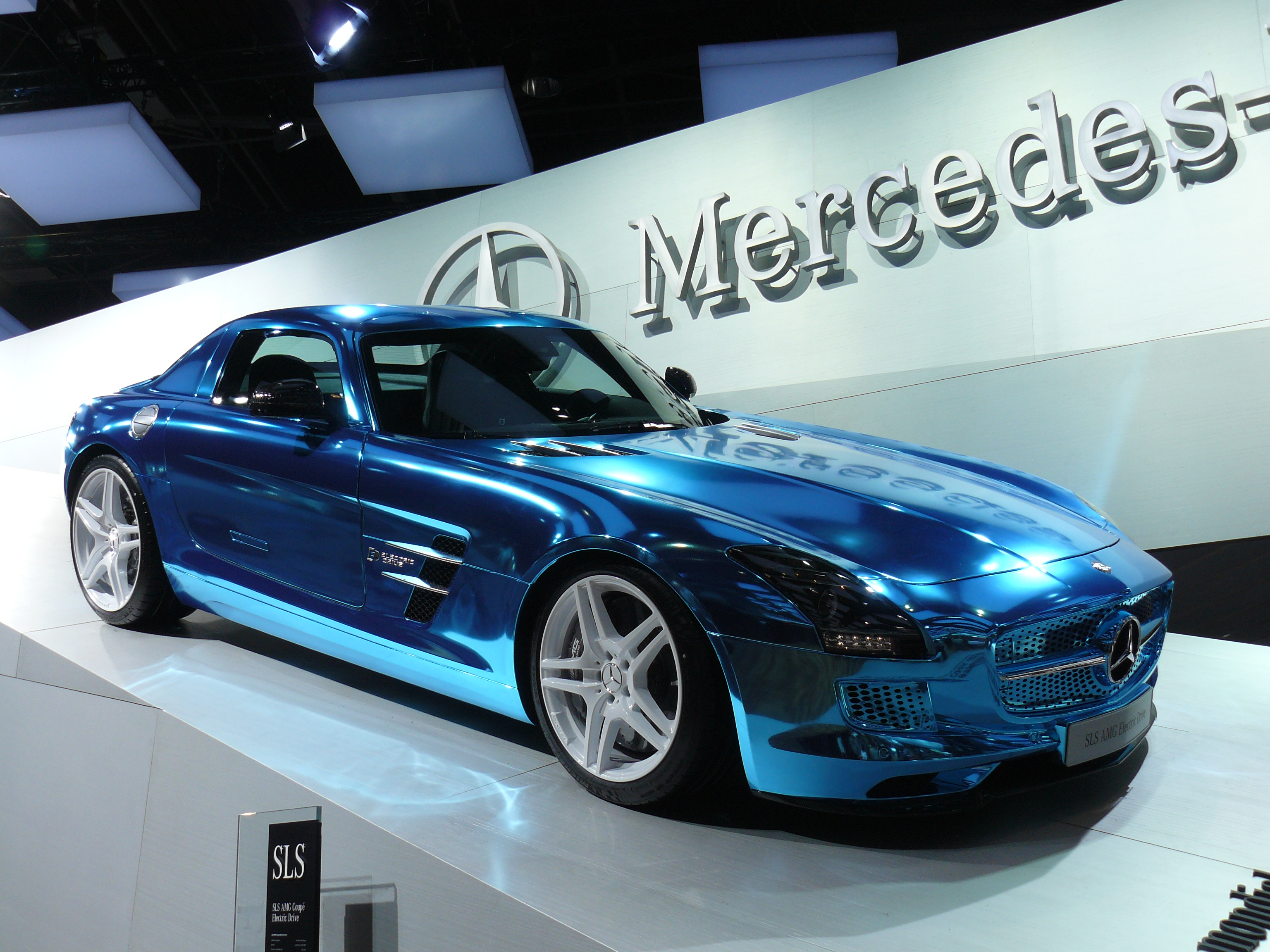 Salon de Paris 2012